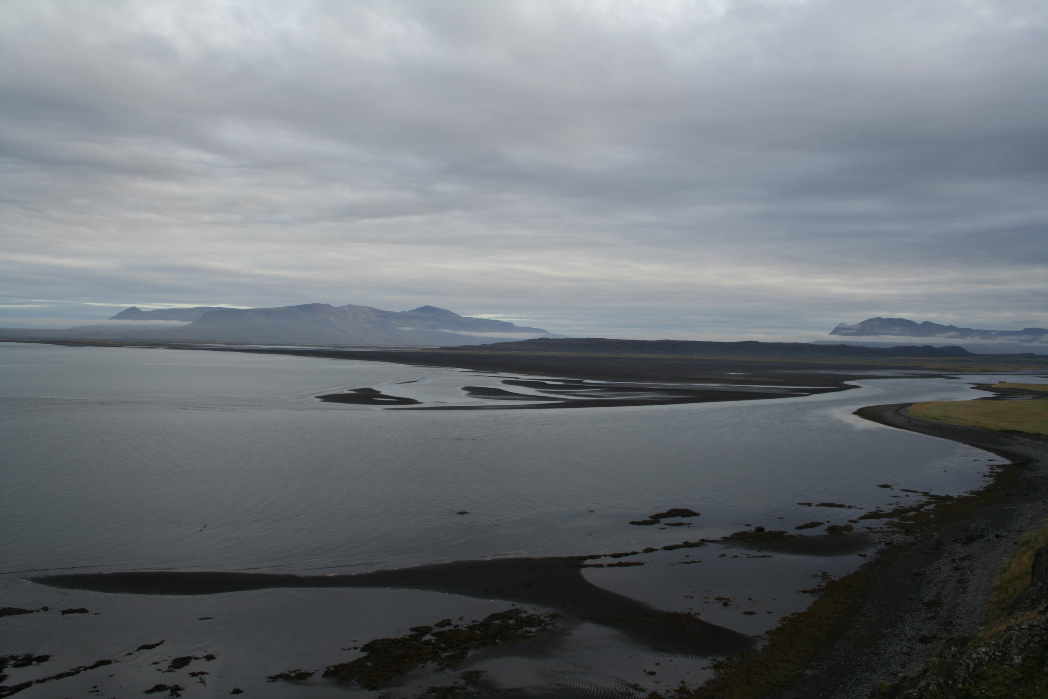 Sigríðarstaðavatn lake meets Húnaflói, inlet of Greenland sea